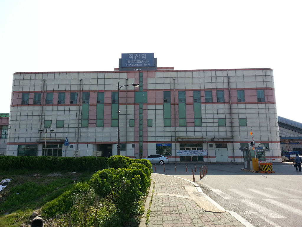 직산역 (천안시)